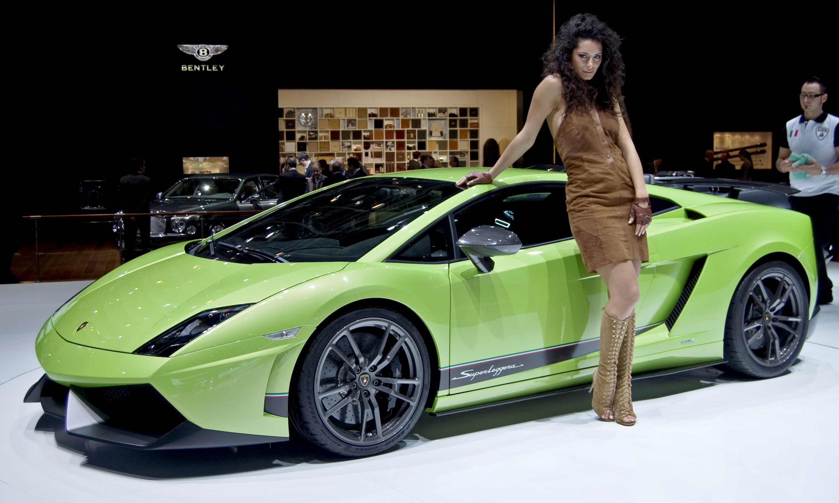 Lamborghini Gallardo LP570-4 Superleggera en el Salón de Ginebra 2010.